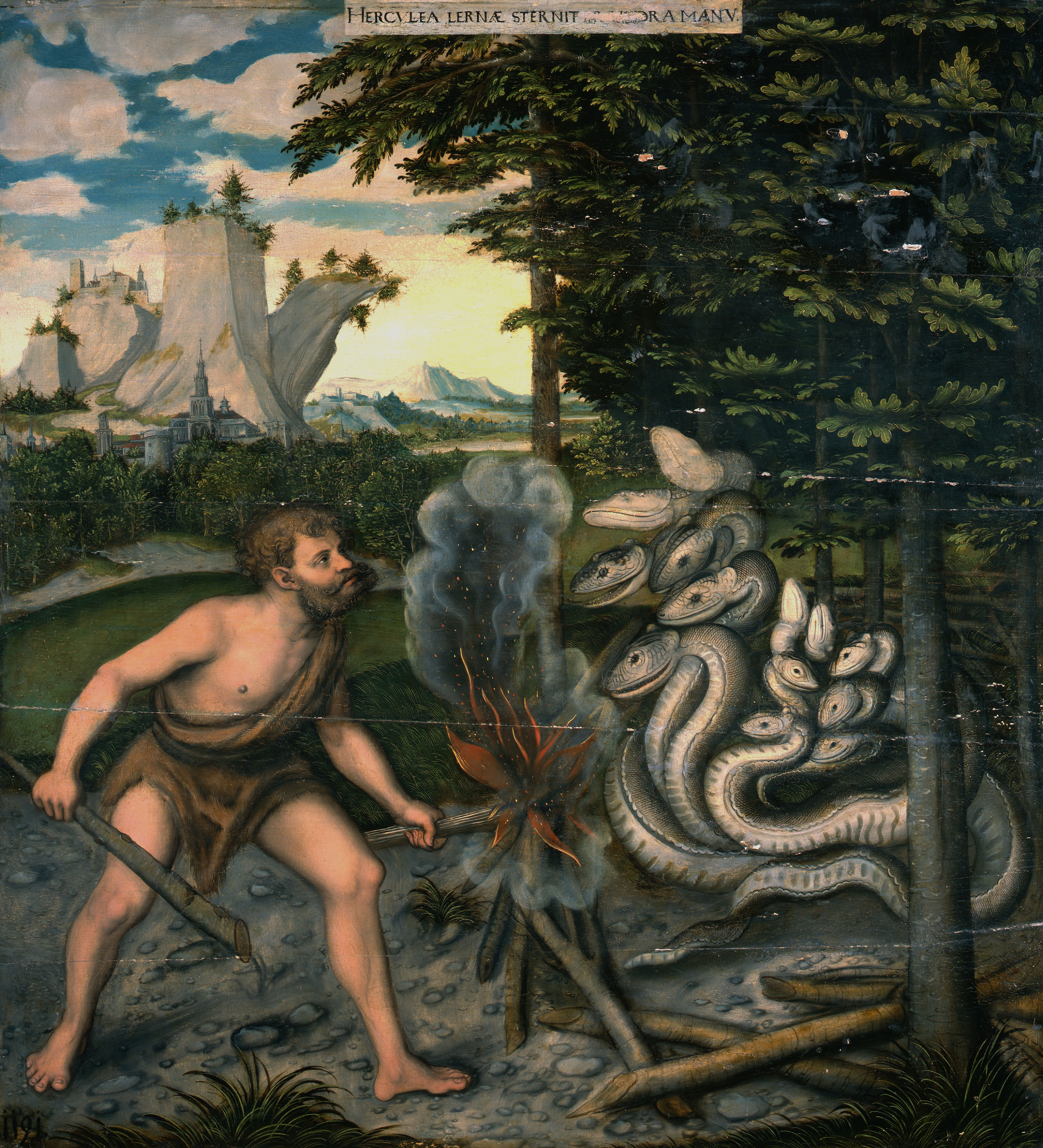 Bildfolge zur Herkules-Legende